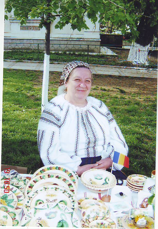 meșter popular